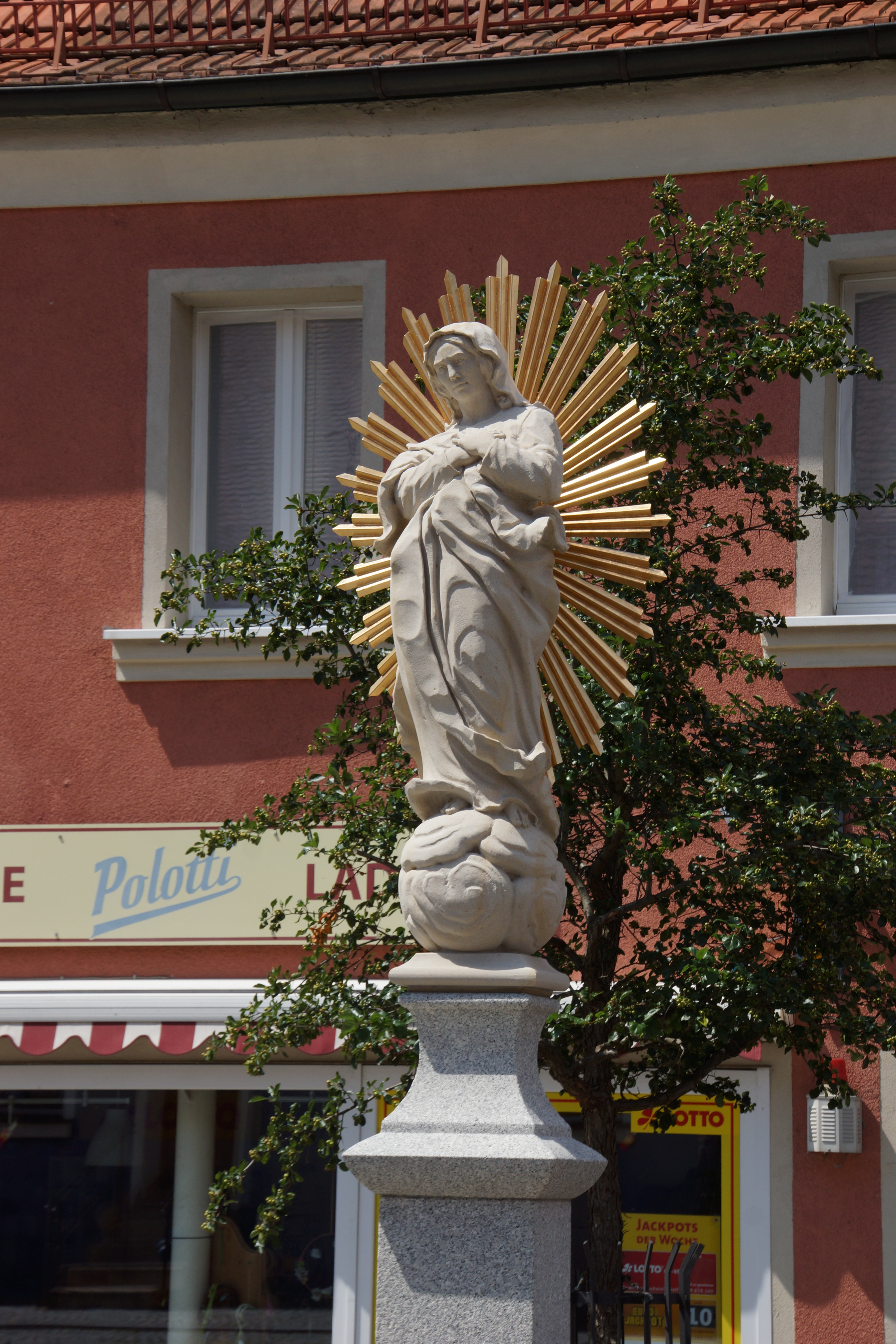 Luhe in der Oberpfalz